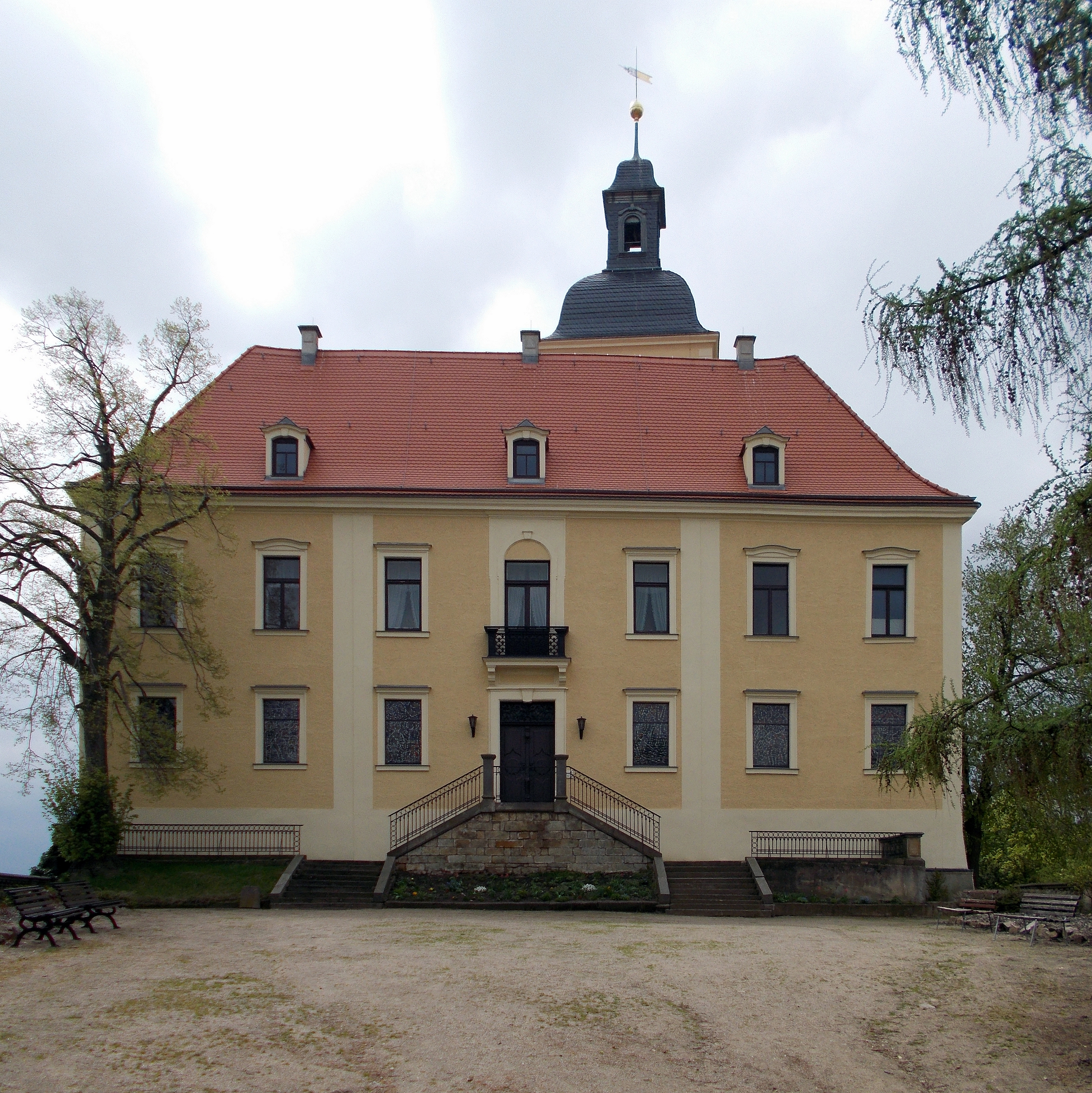 Schloss Hirschstein in Sachsen an der Elbe bei Meißen. Auch unter Schloss Neuhirschstein bekannt. Hier war auch einmal ein Kinderheim eingerichtet.